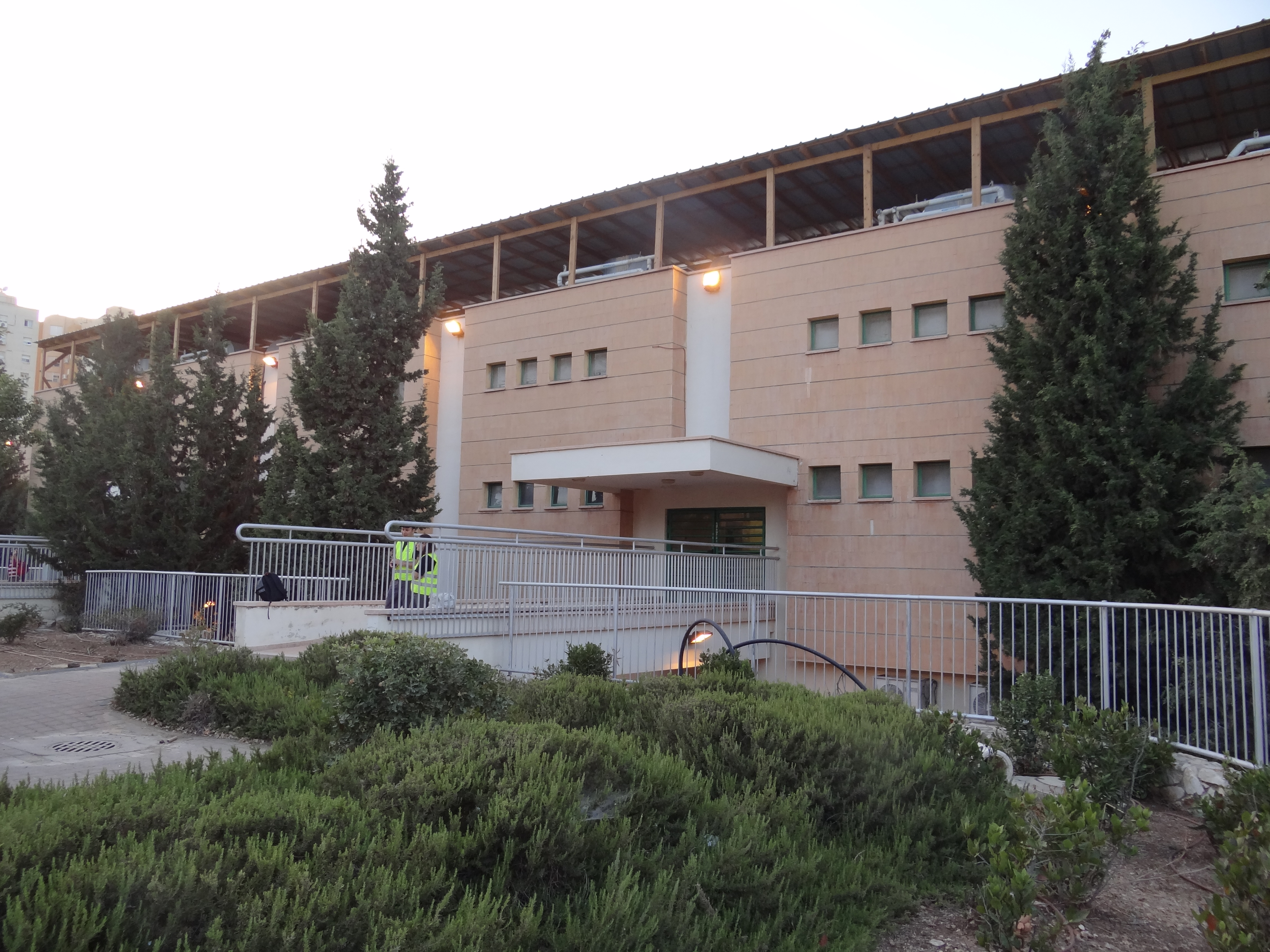 אולם הספורט רמות יצחק המשמש כאולם כדורסל למשחקי הבית של קבוצת הפועל נשר . וכמו כן שימש את קבוצת מכבי חיפה במשך שנתיים, בעקבות שדרוג היכל הספורט רוממה. התמונות צולמו במהלך אירוע לציון הספורט בנשר